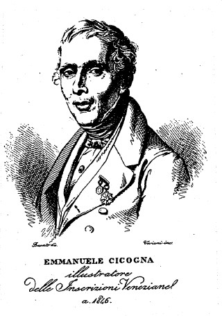 Lo storiografo e collezionista veneziano Emmanuele Antonio Cicogna (1789-1868)